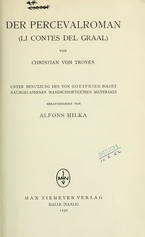 5: Der Percevalroman (Li contes del Graal) / von Christian von Troyes ; unter benutzung des van Gottfried Baist nachgelassenen Handschriftlichen Materials hrsg. von Alfons Hilka. - Halle : Max Niemeyer, 1932. - LIV, 808 p. . Frontespizio